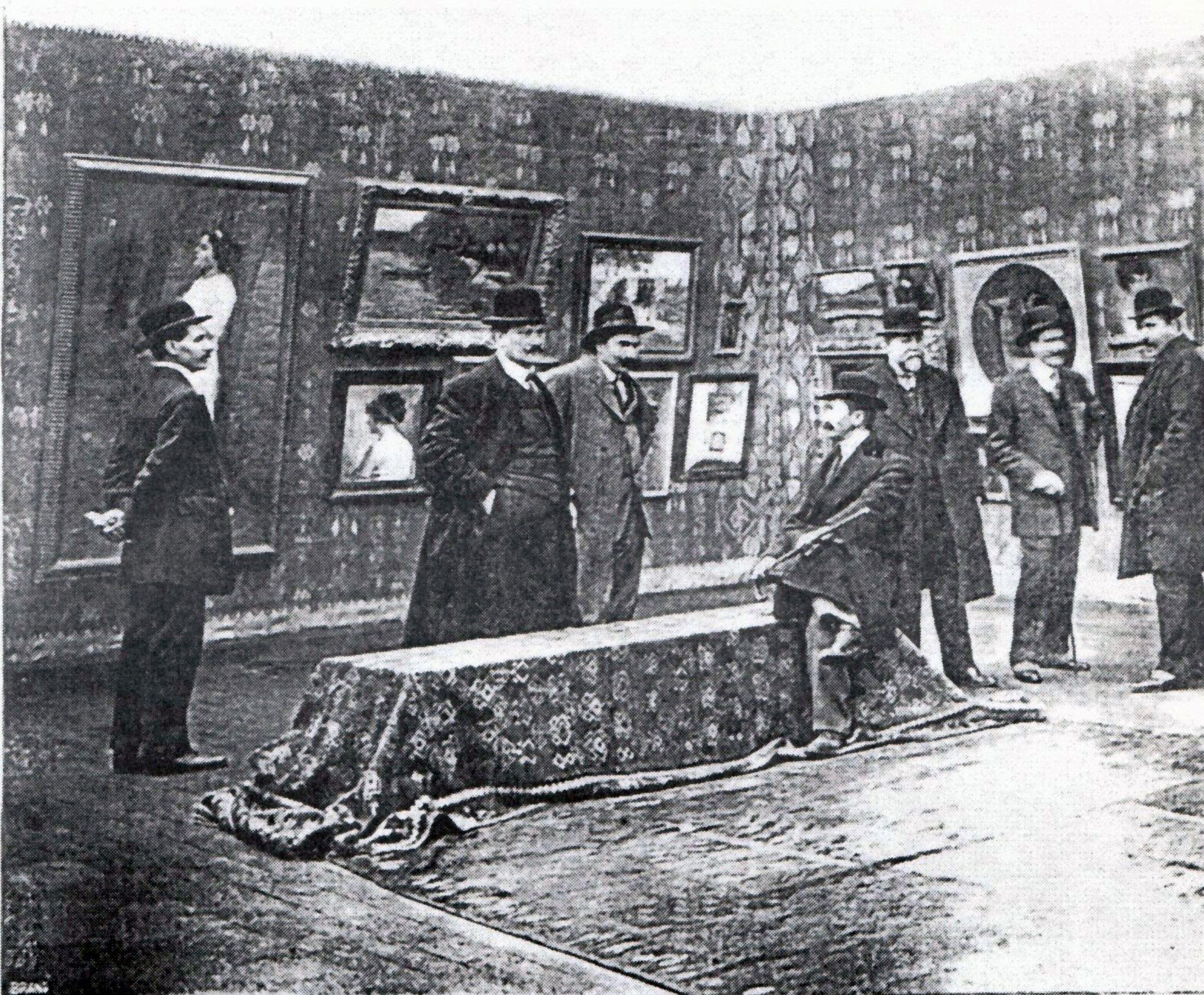 Expozitia Tinerimii artistice din anul 1912